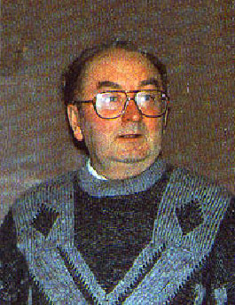 Леонид Николаевич Мурзин